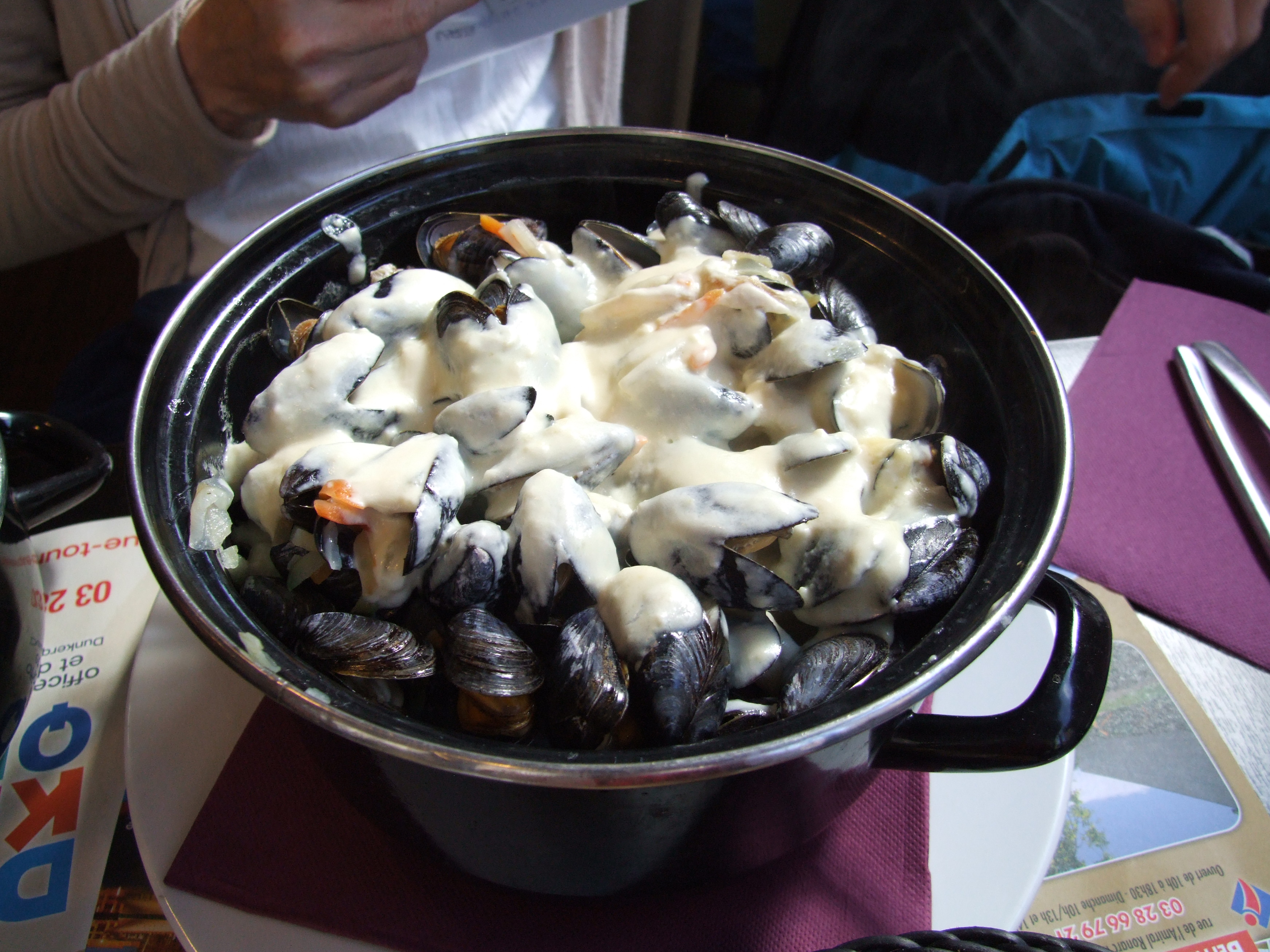 Muschelgericht - eine Variante der Kombination Moules et Frites der Flämischen Küche